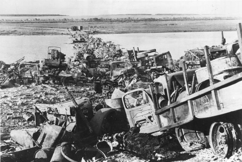 ADN-Bildarchiv II. Weltkrieg 1939-1945 An der Front in der Sowjetunion; Juli 1942 Zurückgehende sowjetische Truppen versuchen hier über den Don zu setzen und erlitten dabei durch deutsche Angriffe große Verluste. 3733-42